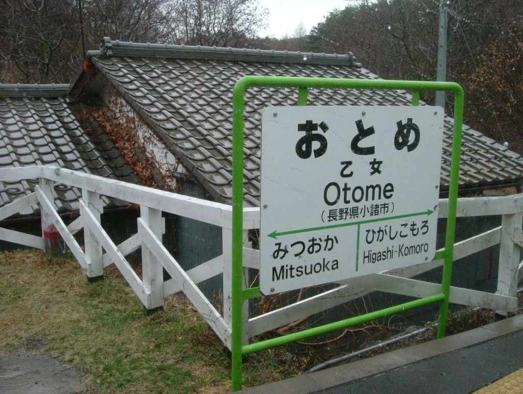 中文（台灣）: 長野縣小諸市乙女車站內站牌，本人親自攝於2006年4月5日。